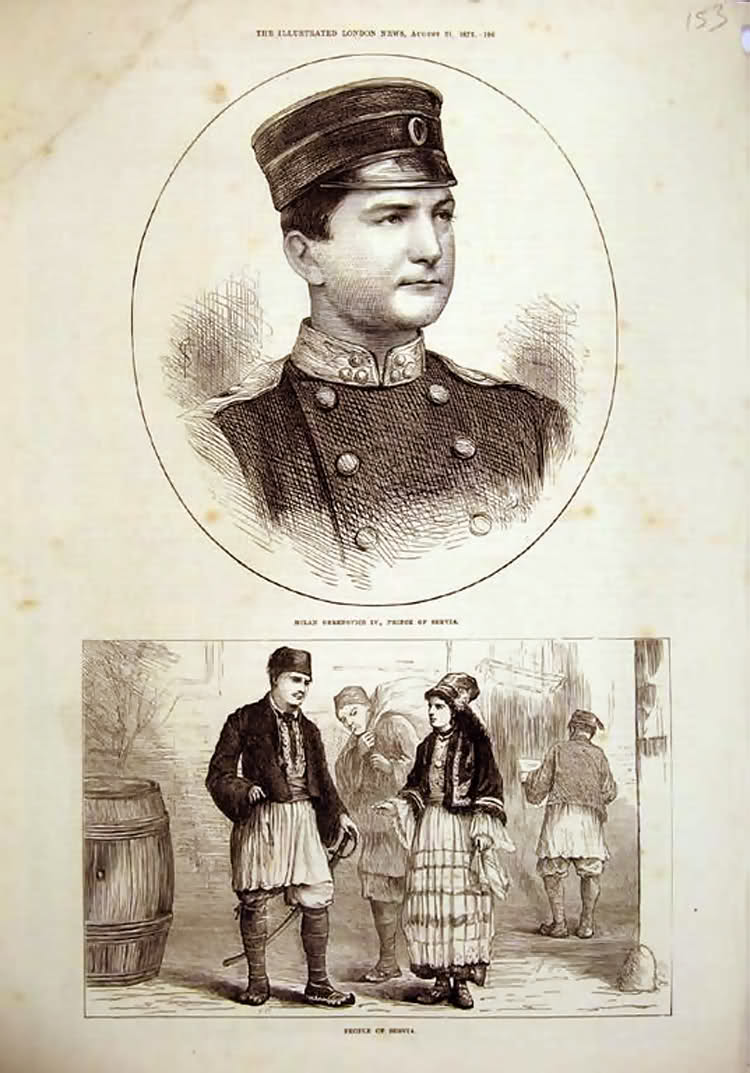 Kralj Milan I Obrenović, prvi kralj Srbije posle kosovskog boja, Naslednik kneza Mihajla Obrenovića i otac kralja Aleksandra Obrenovića